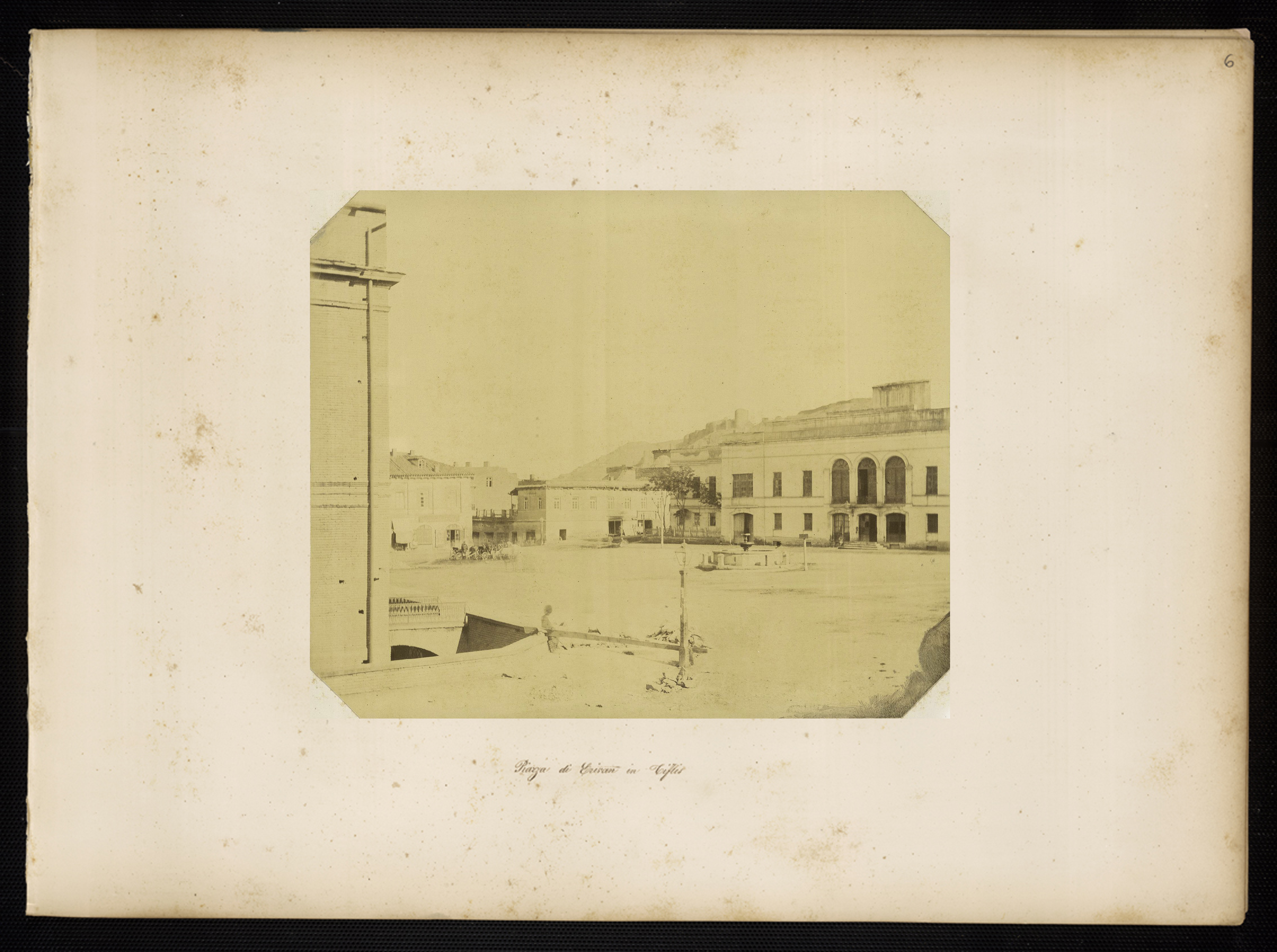 Montabone, Luigi - Piazza di Erivan in Tiflis